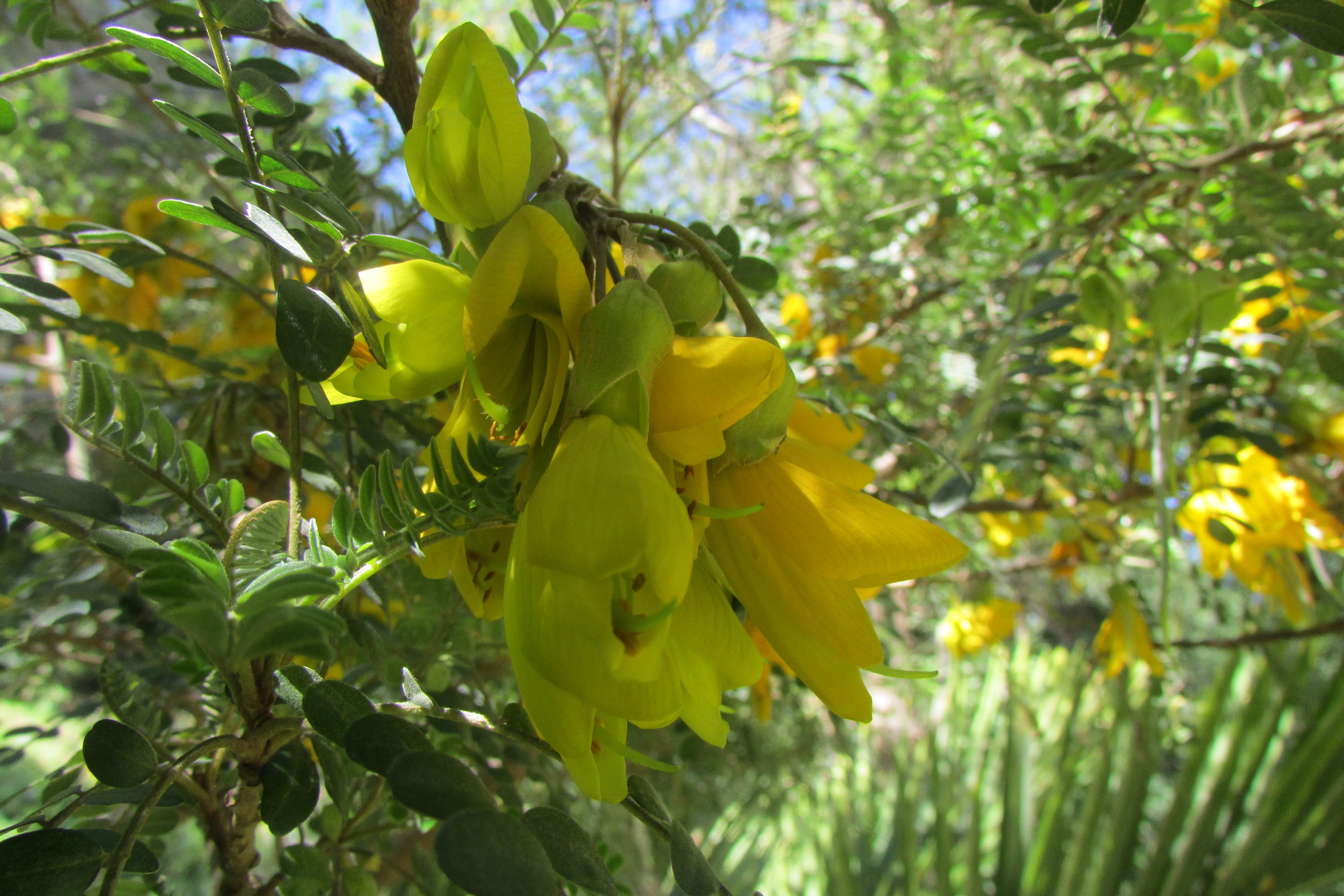 Floración de Sophora masafuerana, JBN, Viña del mar, Chile.